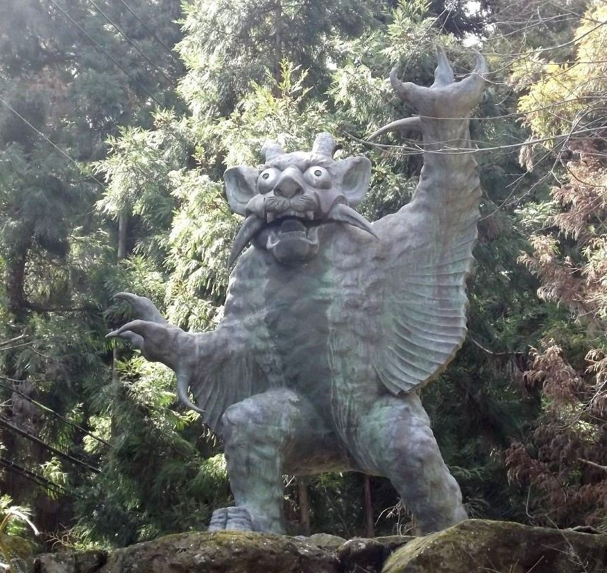 根香寺の牛鬼